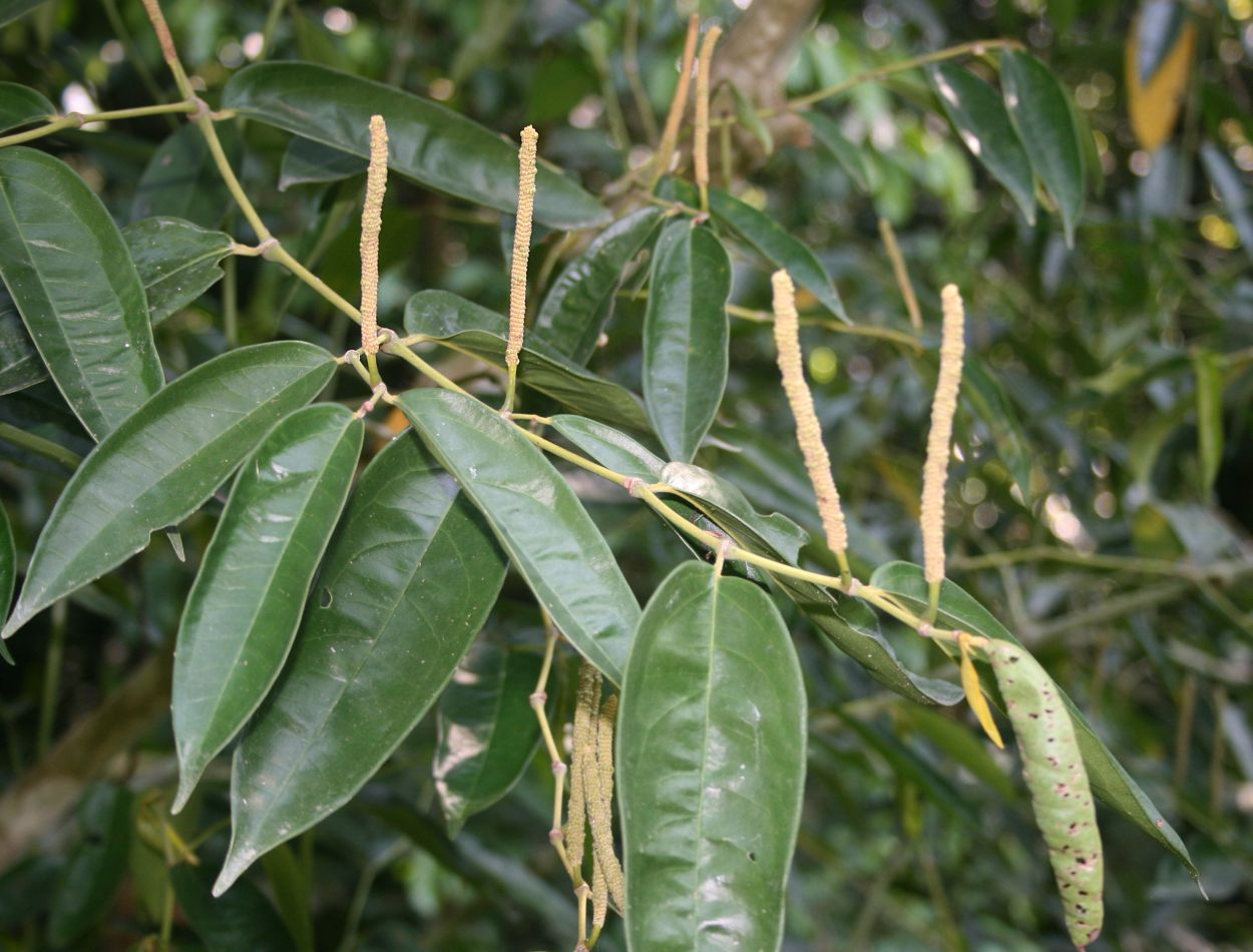 Piper guanacostense, Pfeffergewächse (Piperaceae) - Costa Rica: Prov. Puntarenas, Hacienda Barú NW Dominical, Canal Trail